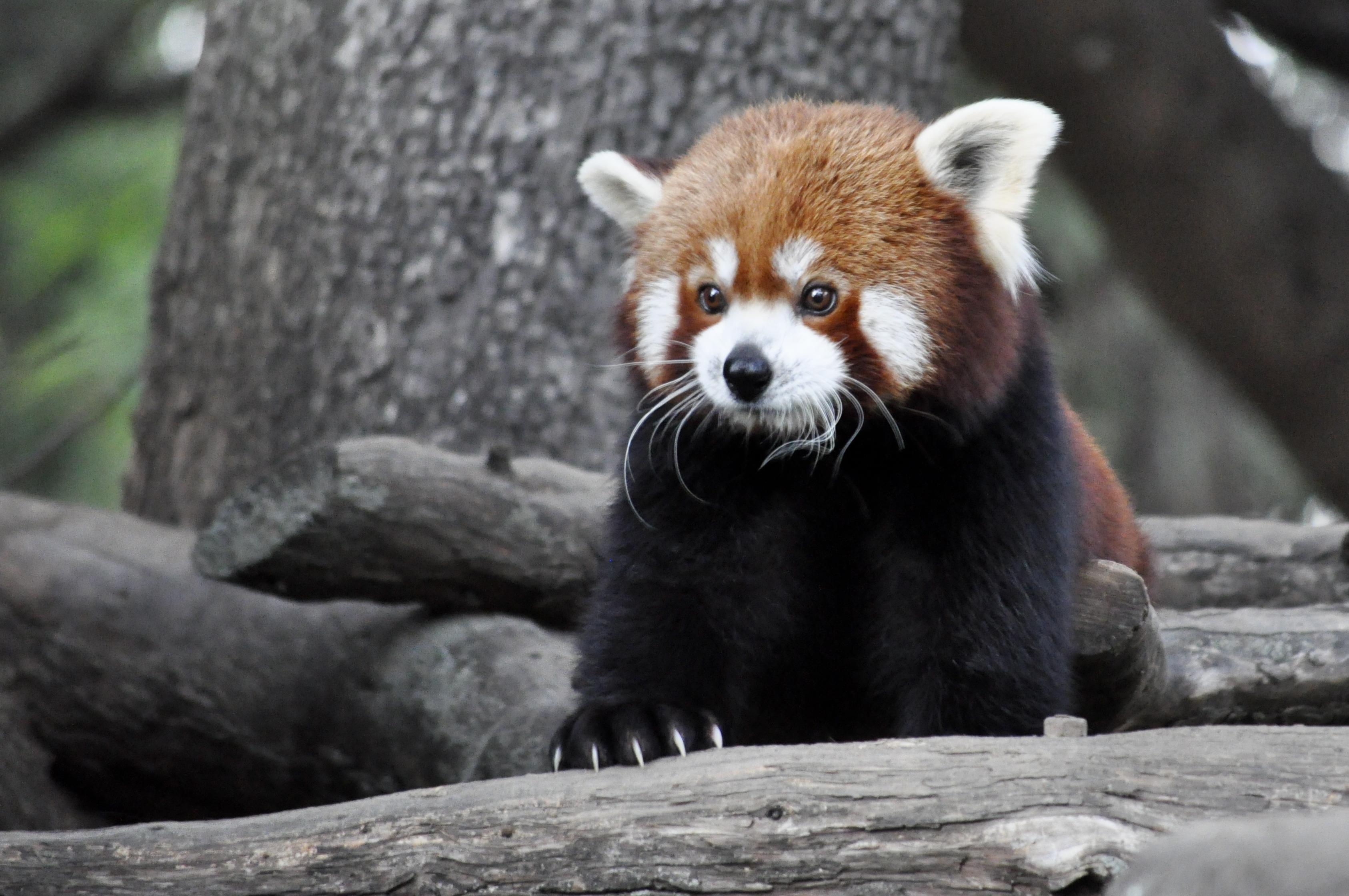 Uno de los ejemplares de panda rojo que se pueden ver actualmente en el zoo de Jerez